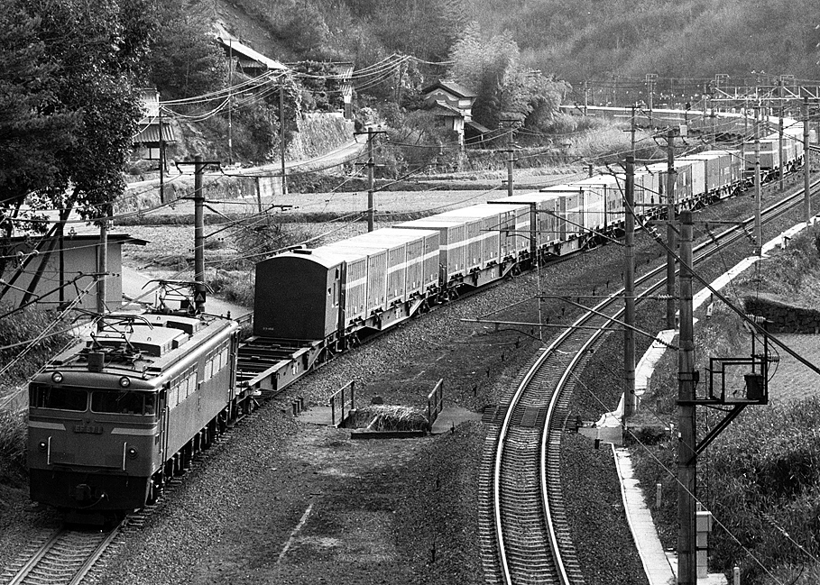 山陽本線 瀬野-八本松間で貨物列車の後補機運用中の 国鉄EF67 1